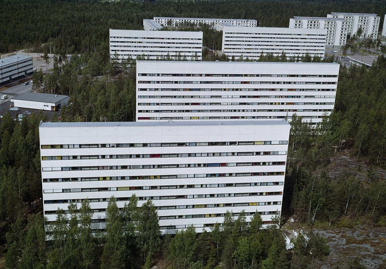 1973 . Mellunkylä, Kontula, Keinulaudantien kerrostaloja.